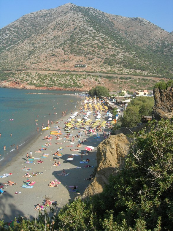 Bali, Creete